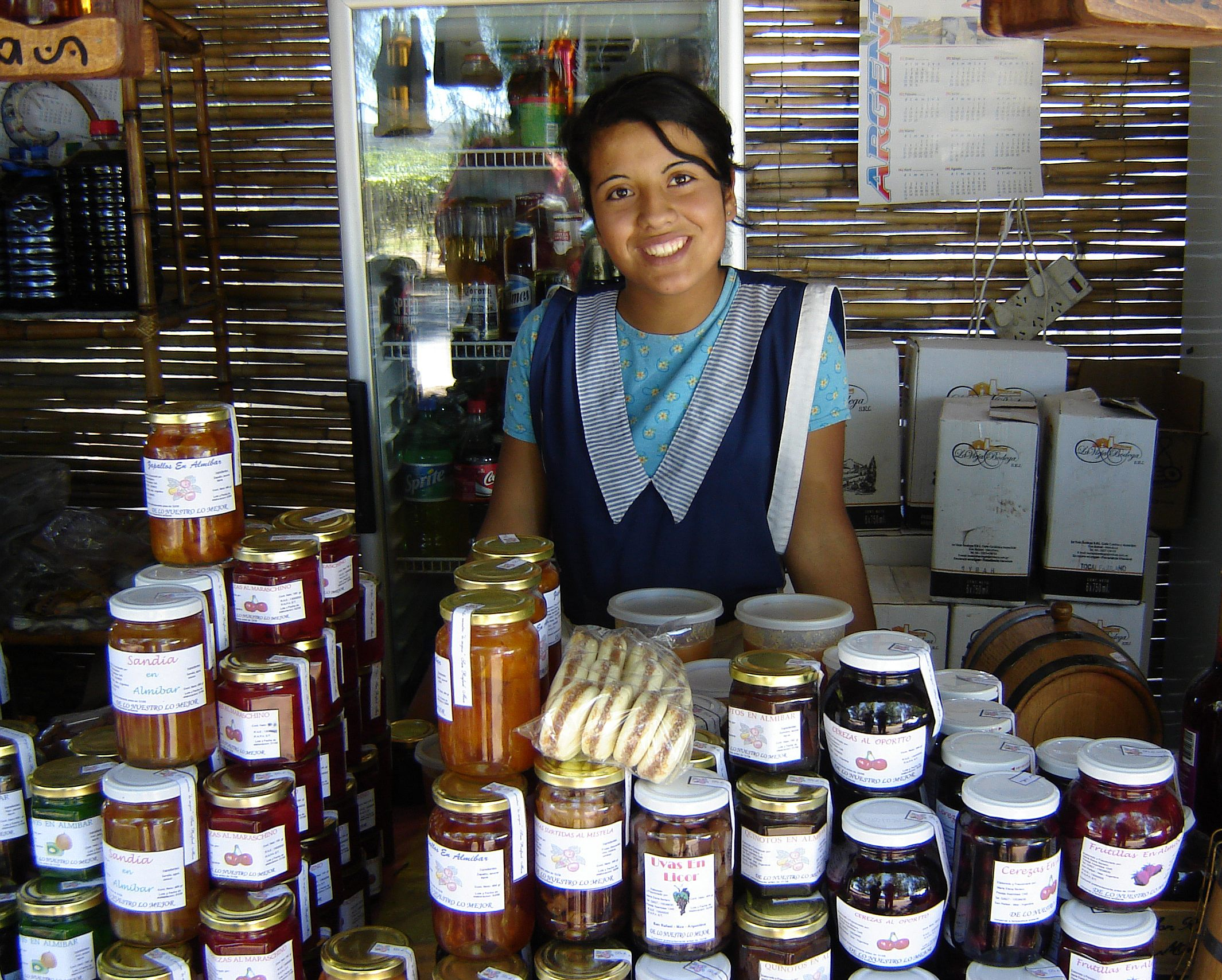 A seller of fruit jam in San Rafael, Mendoza, Argentina